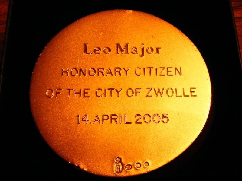 Médaille remise à Léo Major alors qu'il était reçu citoyen honorable par la ville de Zwolle le 14 avril 2005.